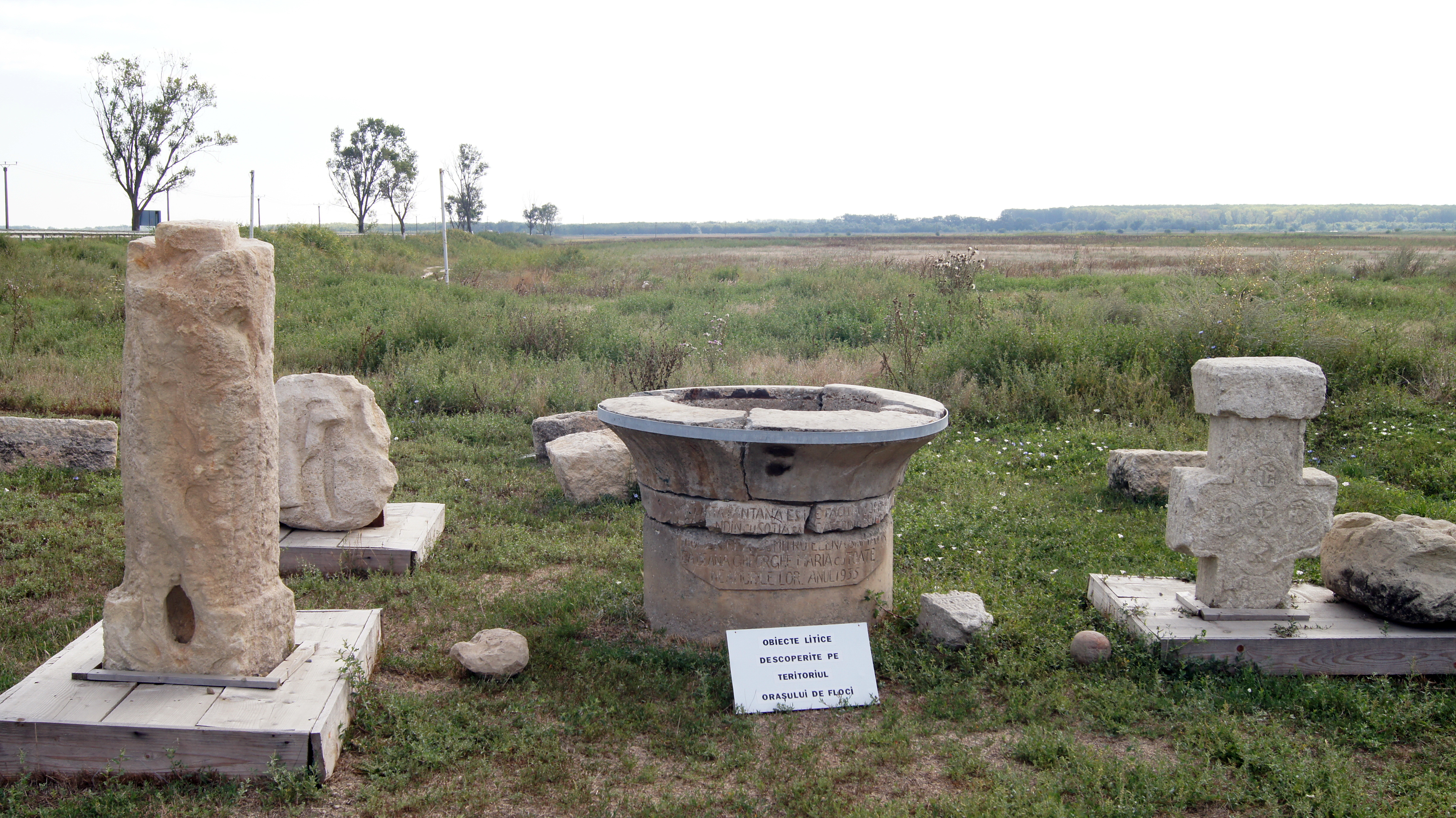 Situl arheologic medieval „Orașul de Floci” Giurgeni